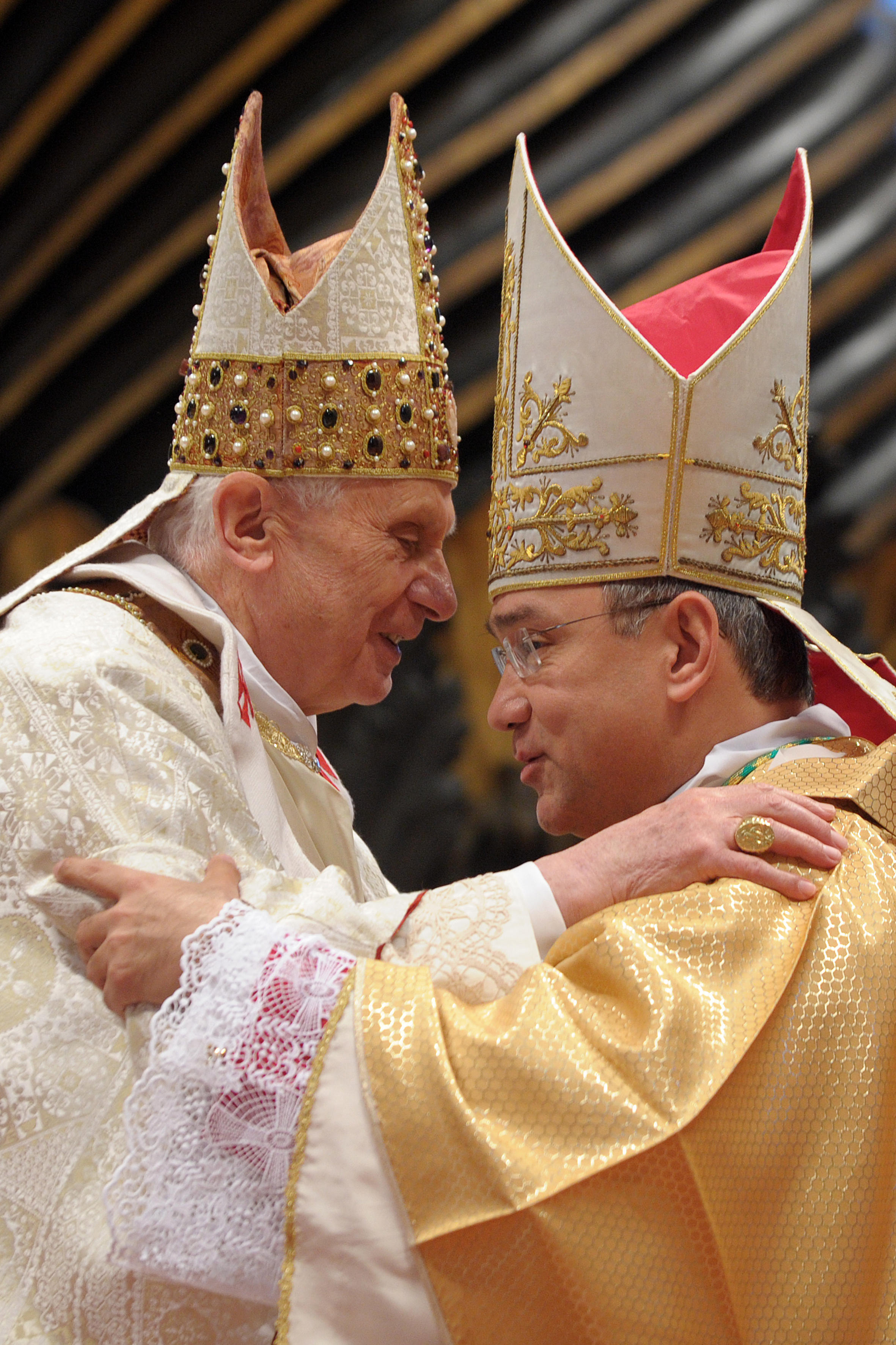 S.S. Benedicto XVI felicita a Mons. Edgar Peña después de su ordenación episcopal el 5 de Febrero de 2011